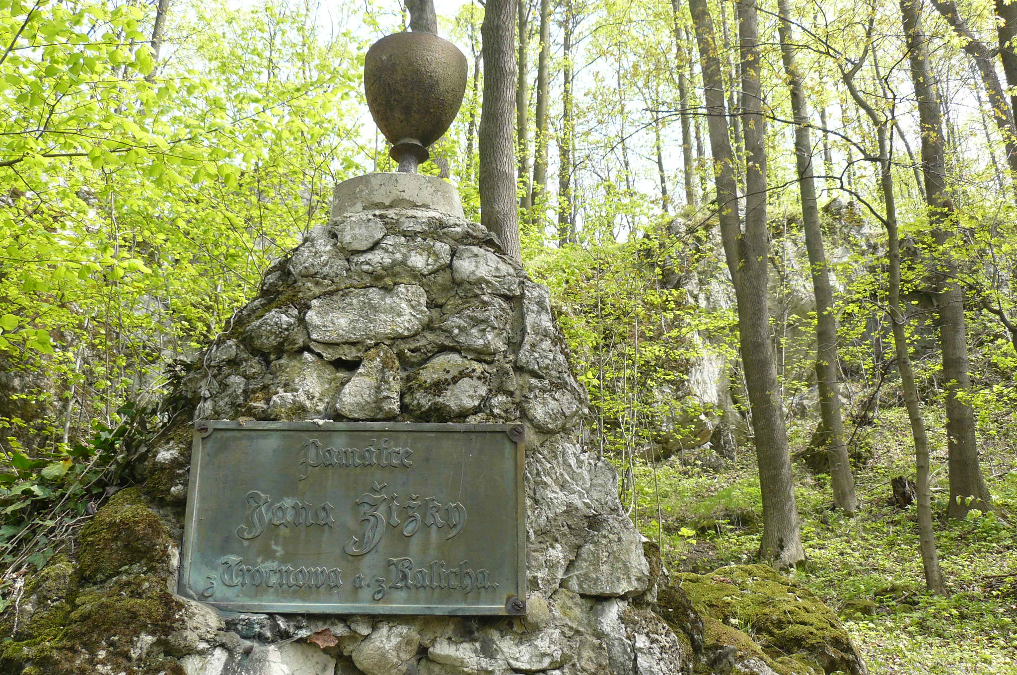 Kotouc - Narodni Sad (Stramberk)